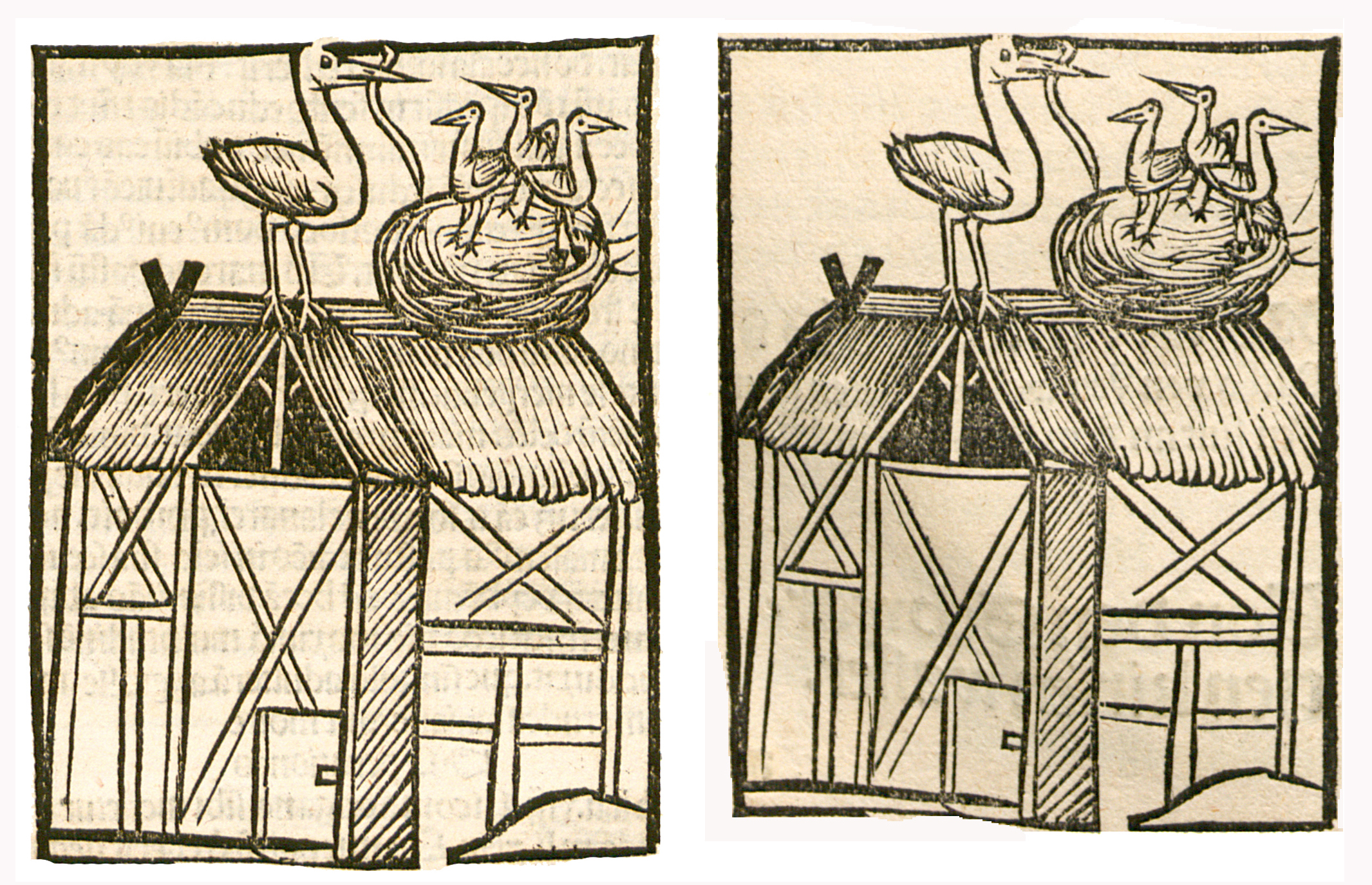 Abbildung vonː Störcke, Junge